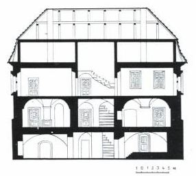 Разрэз дома купца Анташкевіча (Ленінская, 37)